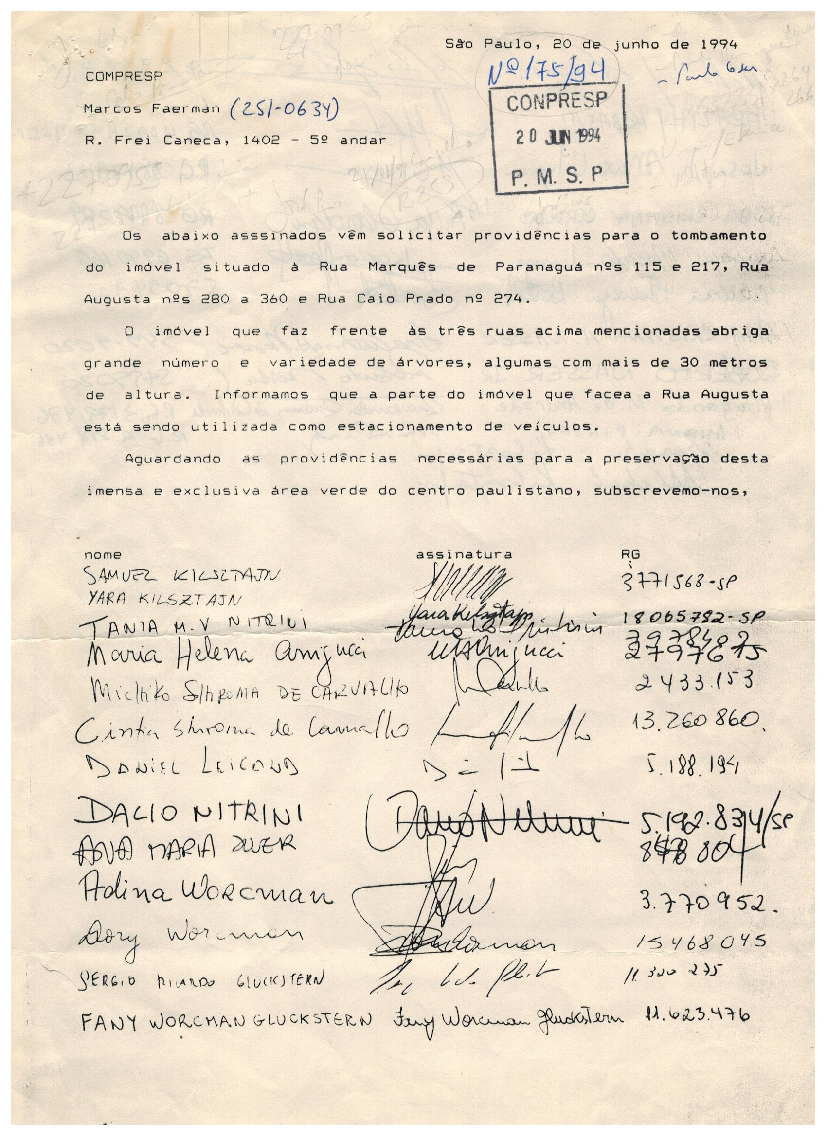 Solicitação ao Conpresp (abaixo assinado)